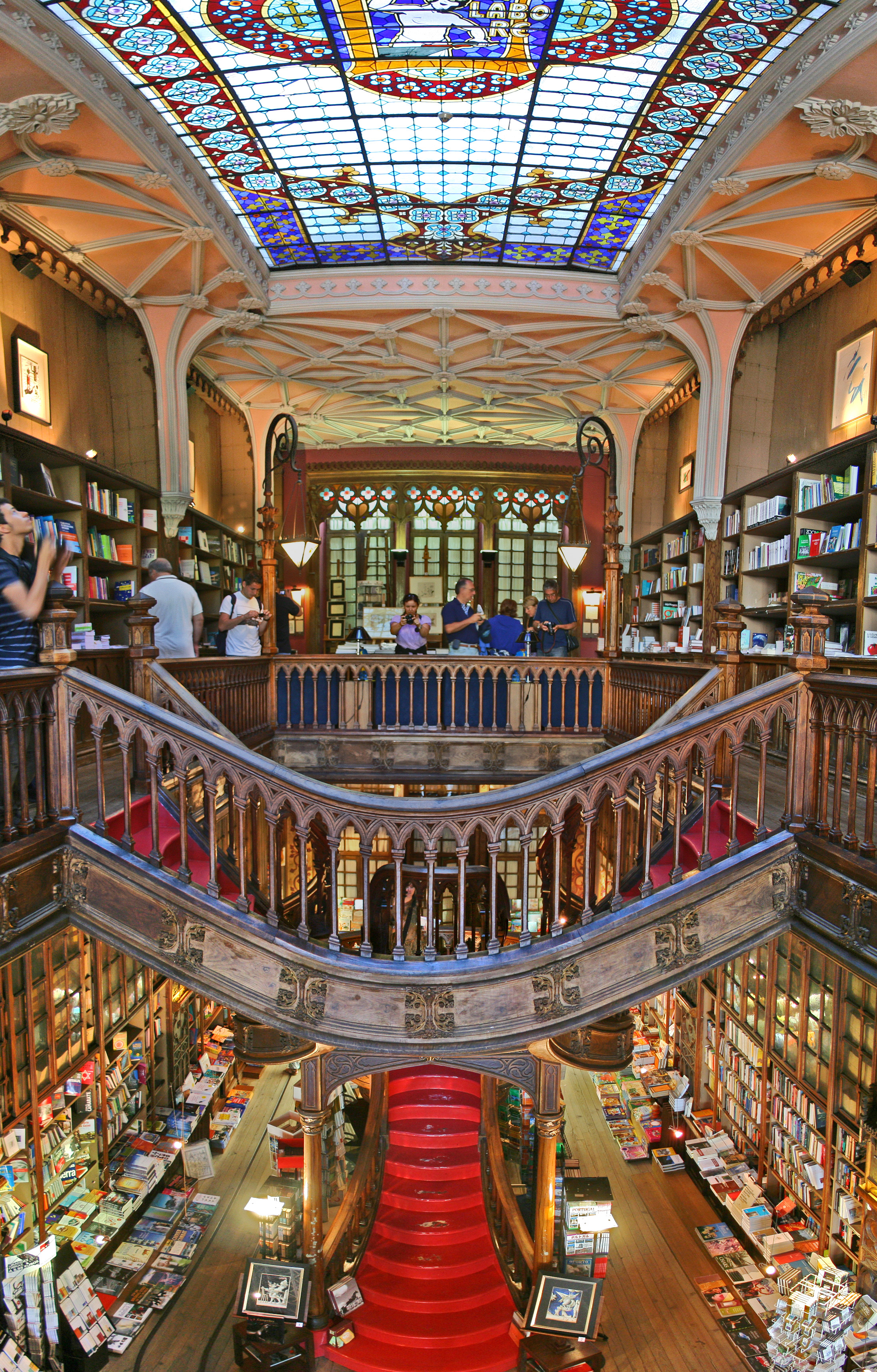 Livraria Lello e Irmão This file was uploaded for Wiki Loves Monuments in Portugal with the unique identifier 72272.